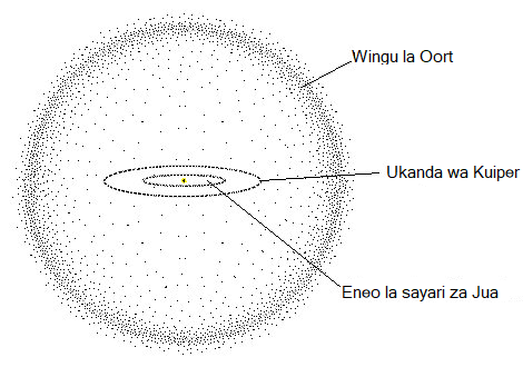 Kiswahili: Wingu la Oort, maelezo yaliswahilishwa